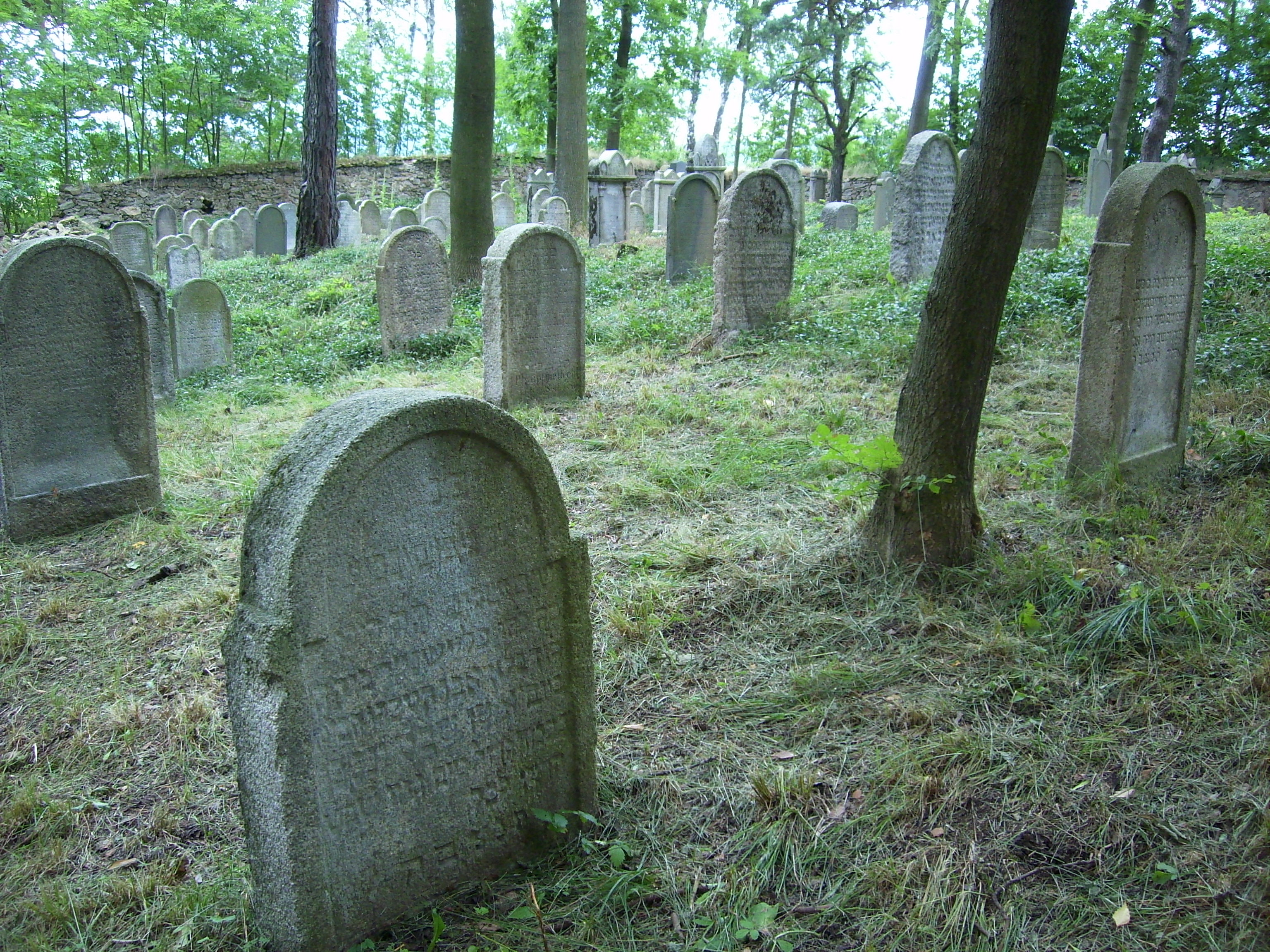 židovský hřbitov v Mutěníně, okr. Domažlice. Stav r. 2009.